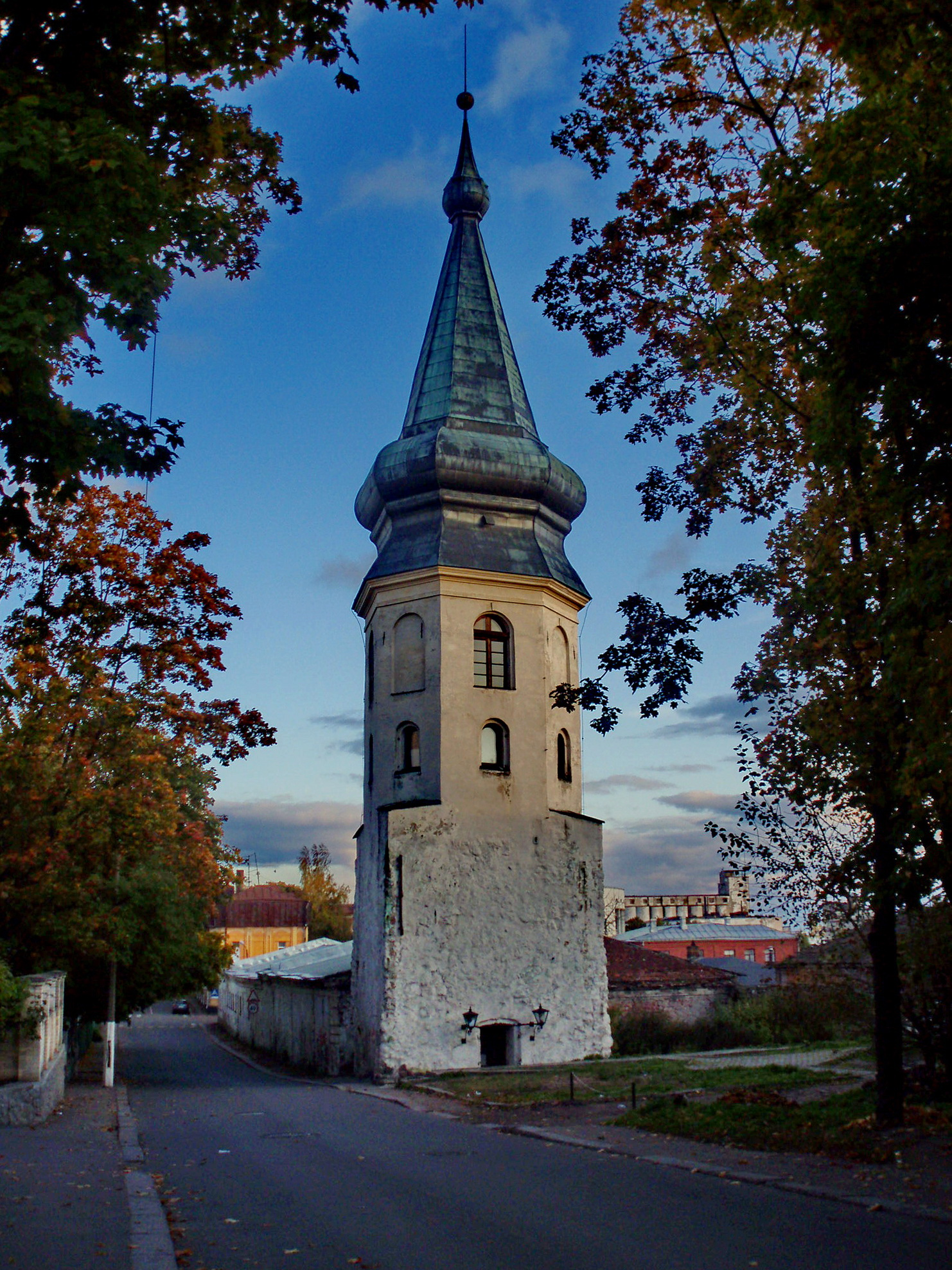 Башня ратуши (Санкт-Петербург и Лен.область, Выборг, Выборгская улица, 15)